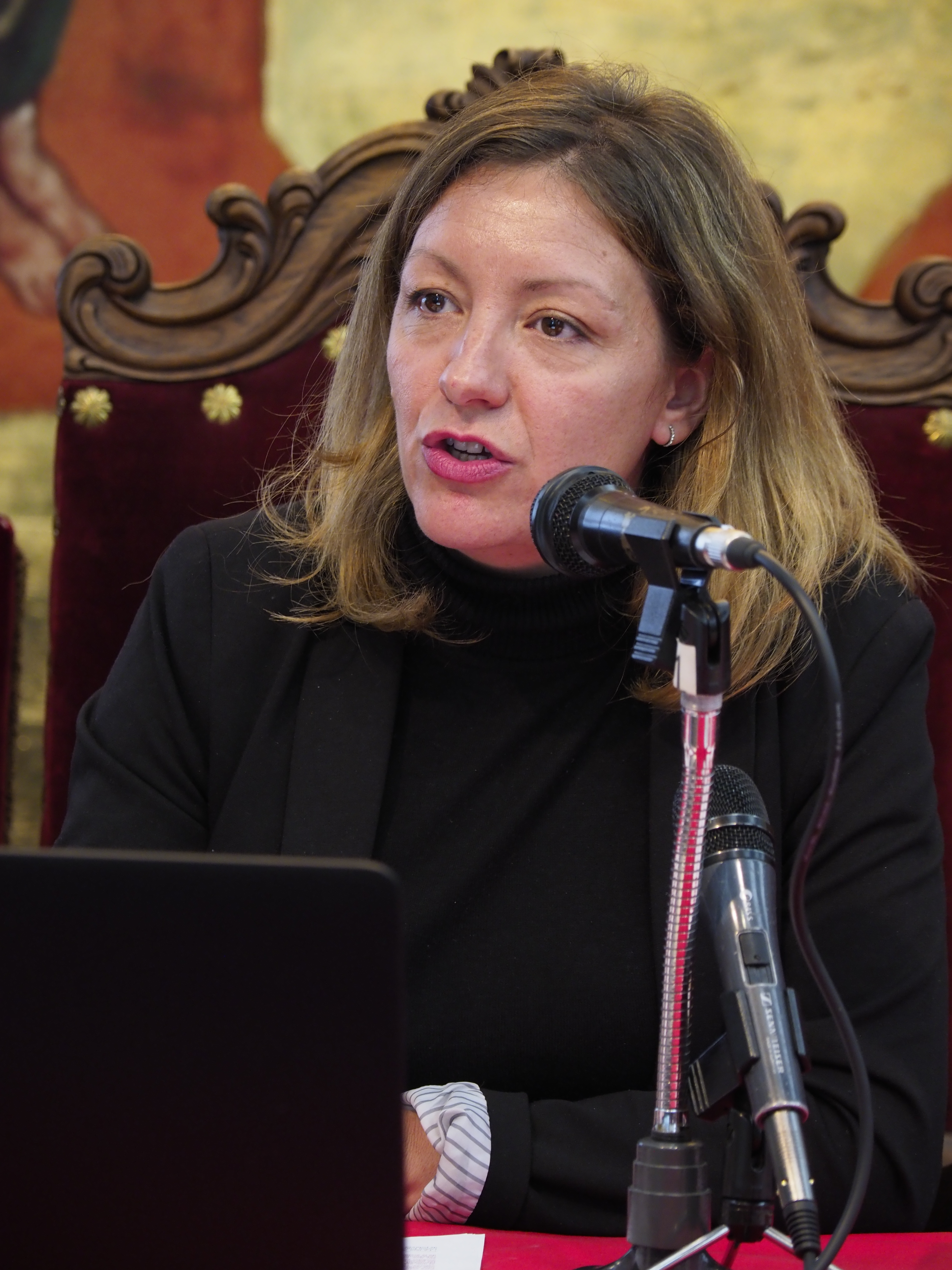 secretaria general de Cáritas Española,​ y directora ejecutiva de la Fundación FOESSA (Fomento de Estudios Sociales y de Sociología Aplicada)